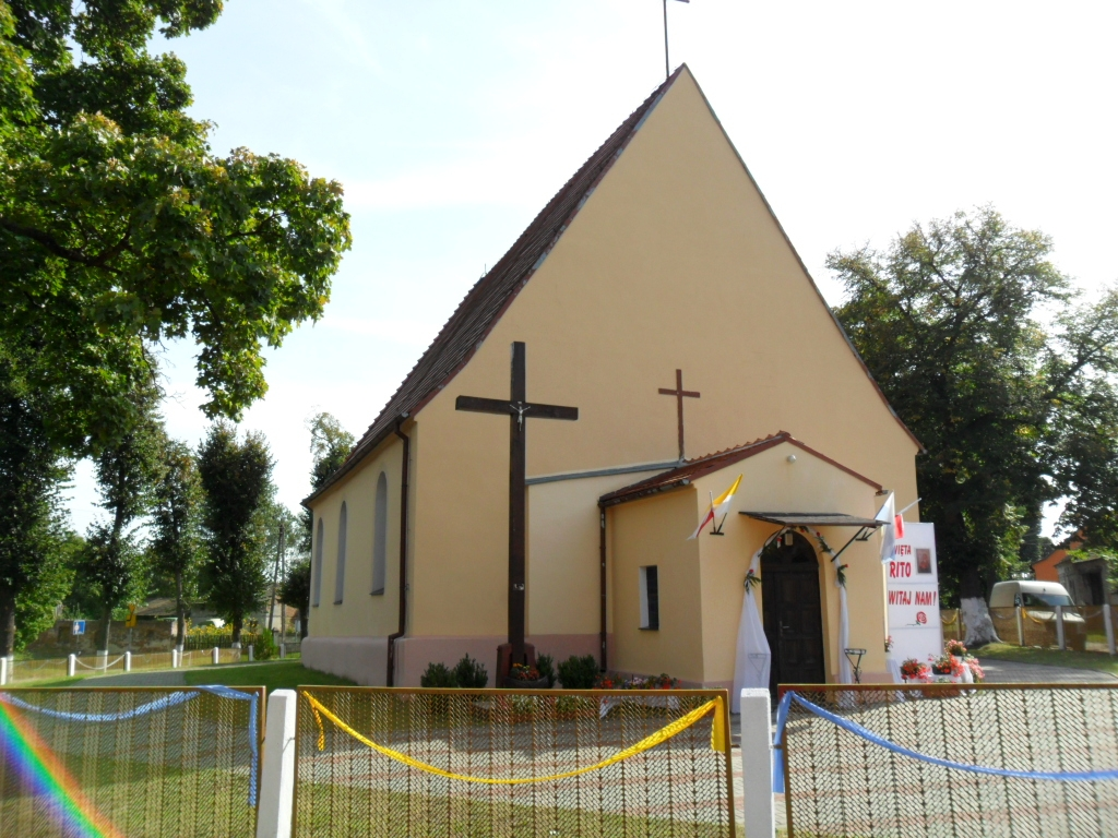 Chlebowo - kościół parafialny p.w. św. Józefa, XIV/XV w. (zabytek nr 280 z 12.04.1961)